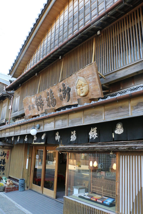 伊勢市二見町の御福餅本家の本店写真です。